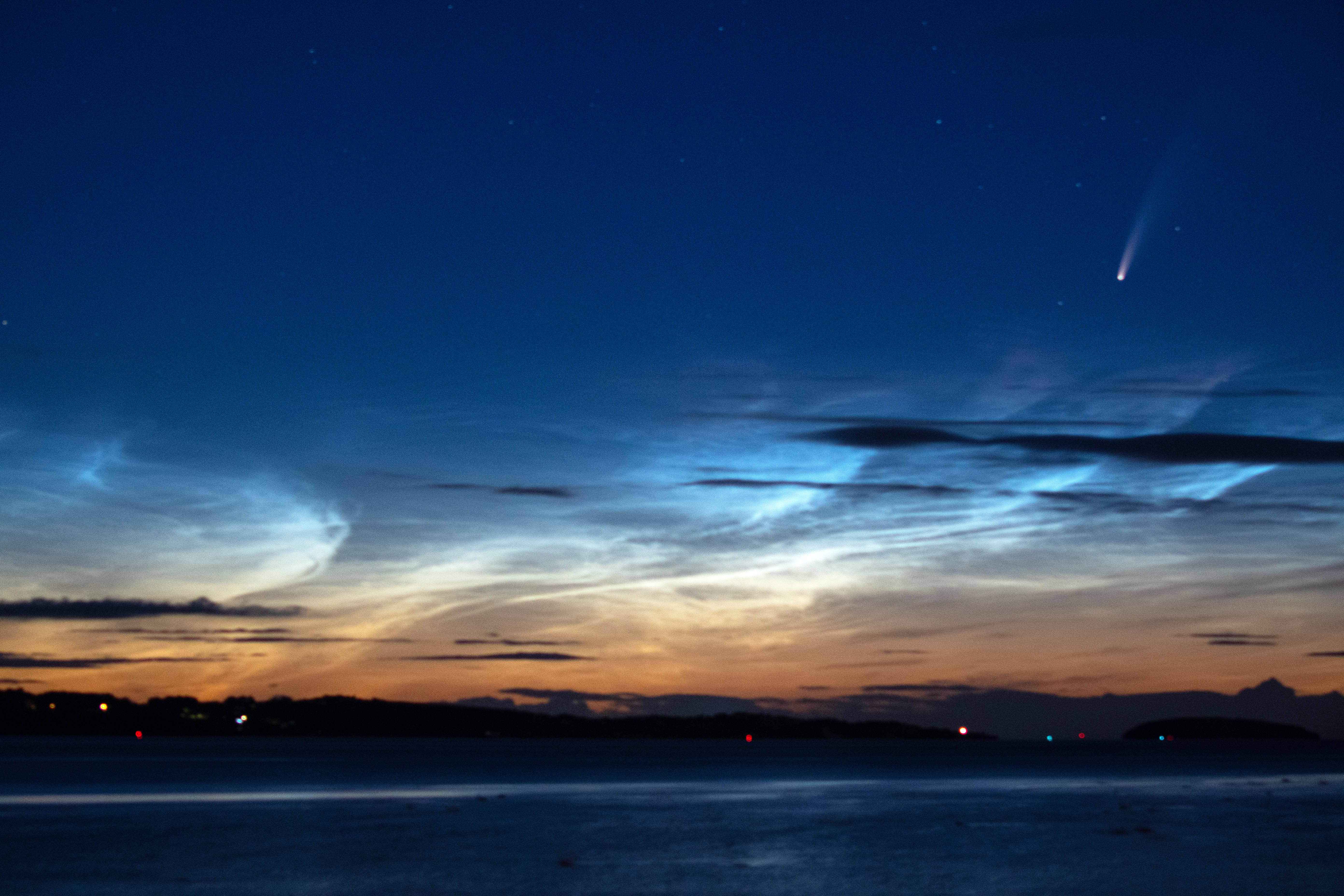 Cymylau nosloyw dros Ynys Môn ac Ynys Seiriol